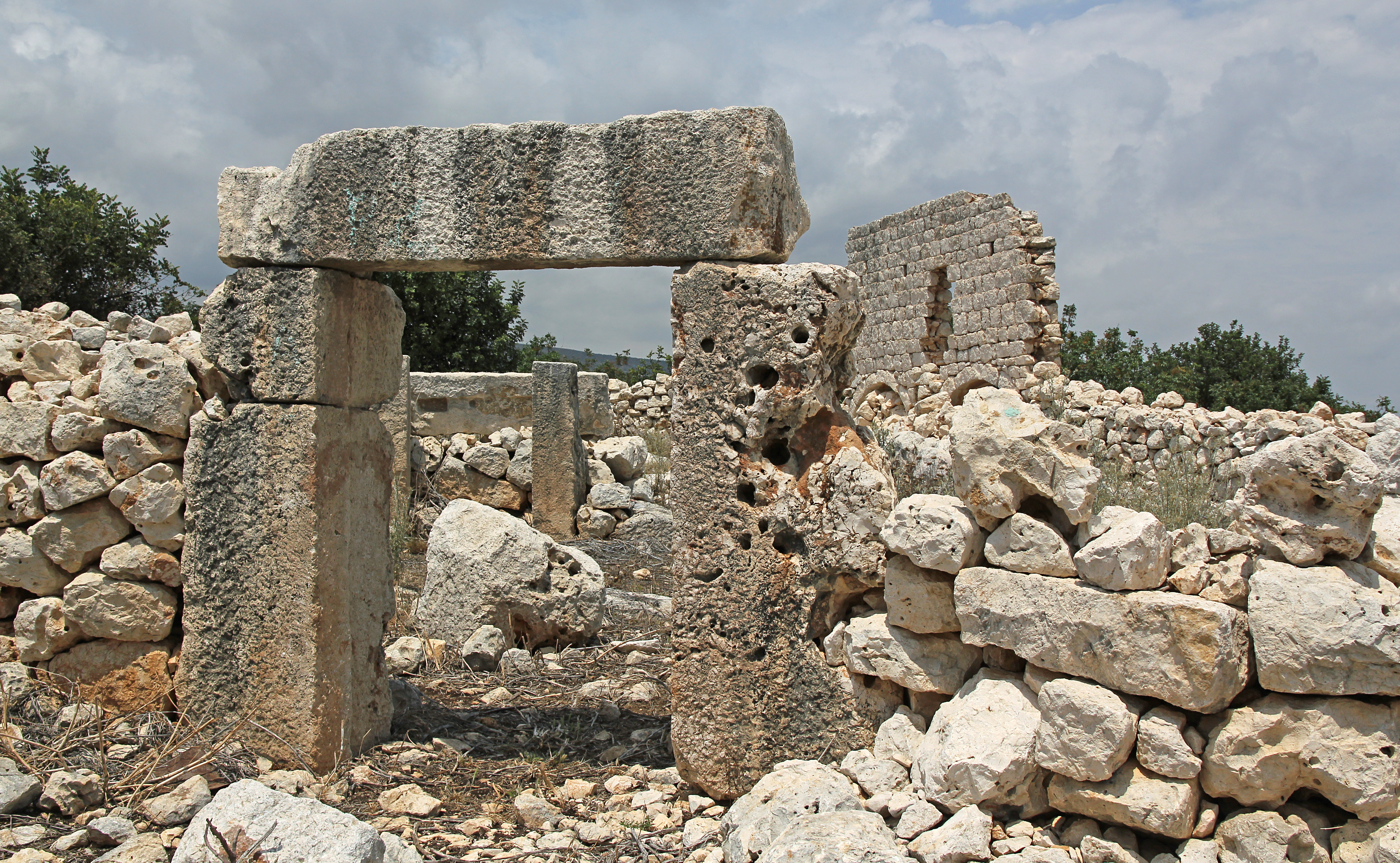 Kızılbağ, römisch-byzantinische Siedlung im Rauhen Kilikien, Südtürkei